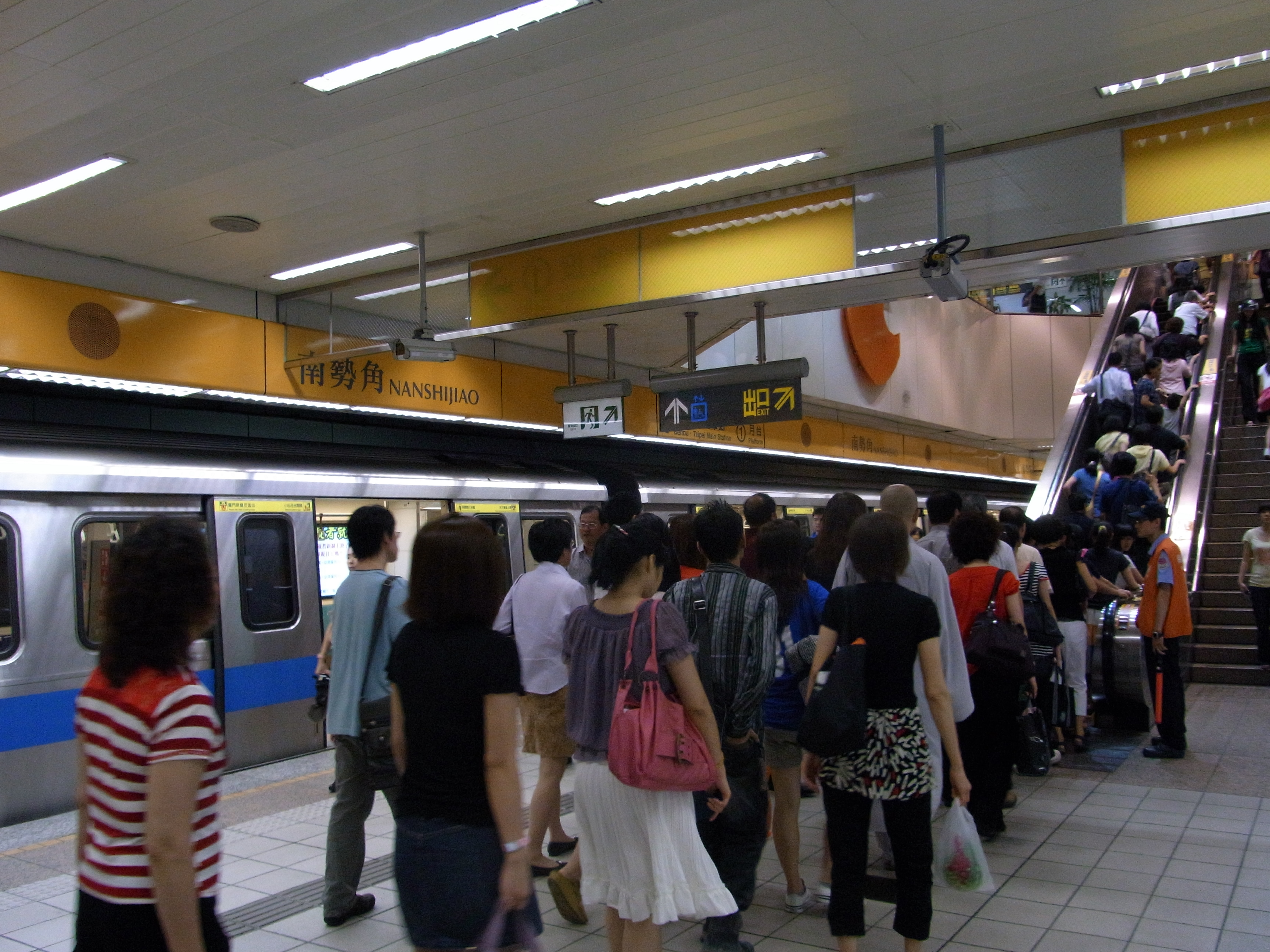 中文（台灣）: 台北捷運南勢角站第一月台